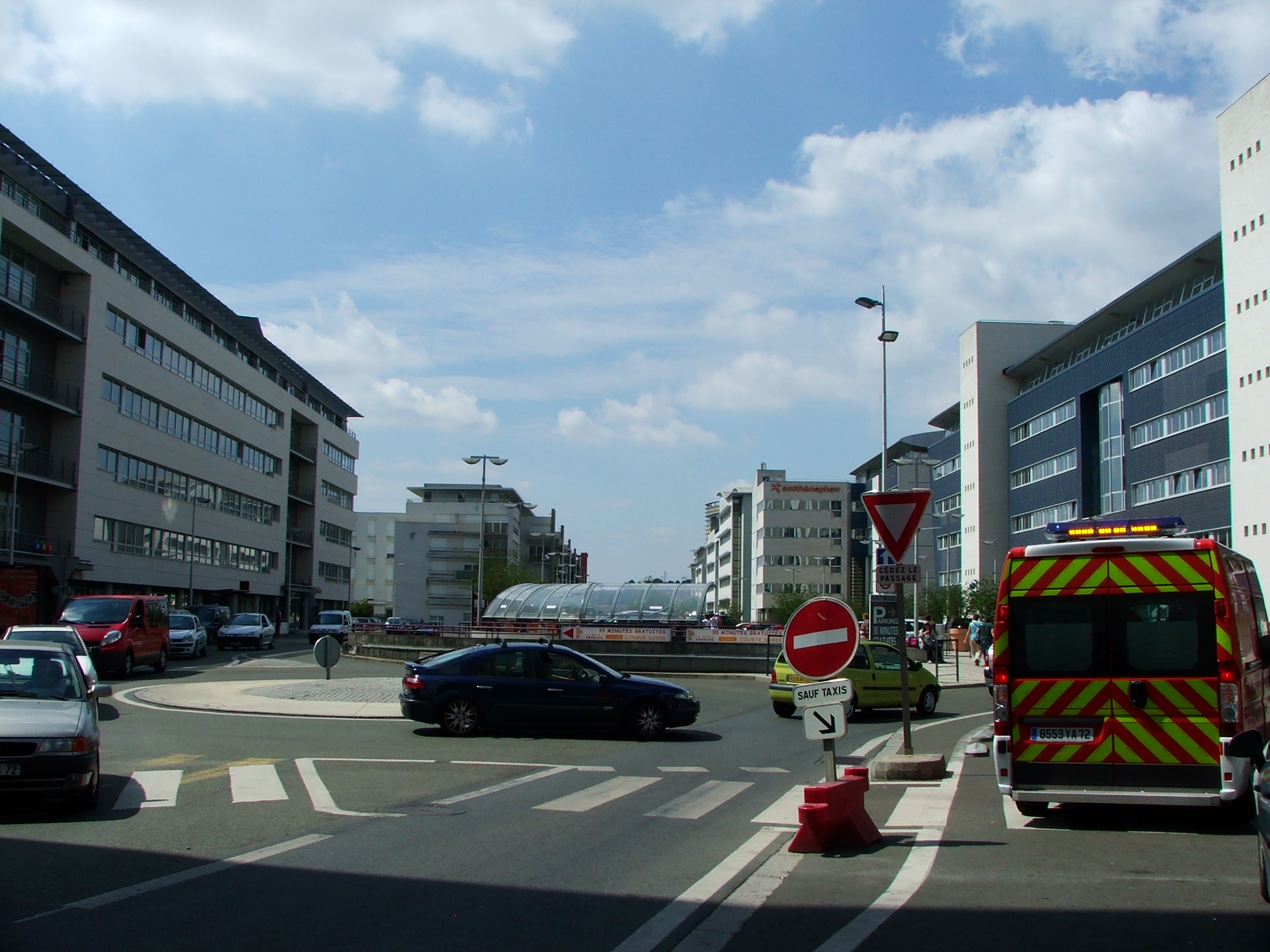 Le Boulevard Alexandre Oyon traversant la gare sud du Mans.